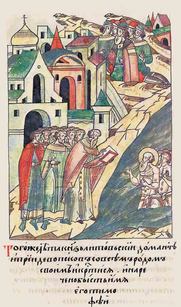 Крещение Домвонта Лицевой летописный свод, надпись под изображением: В тоже лето (6774) князь Литовьский Домант и прииде во Псковъ со всем родомъ своимъ и крестися и наречено бысть имя его Тимофей